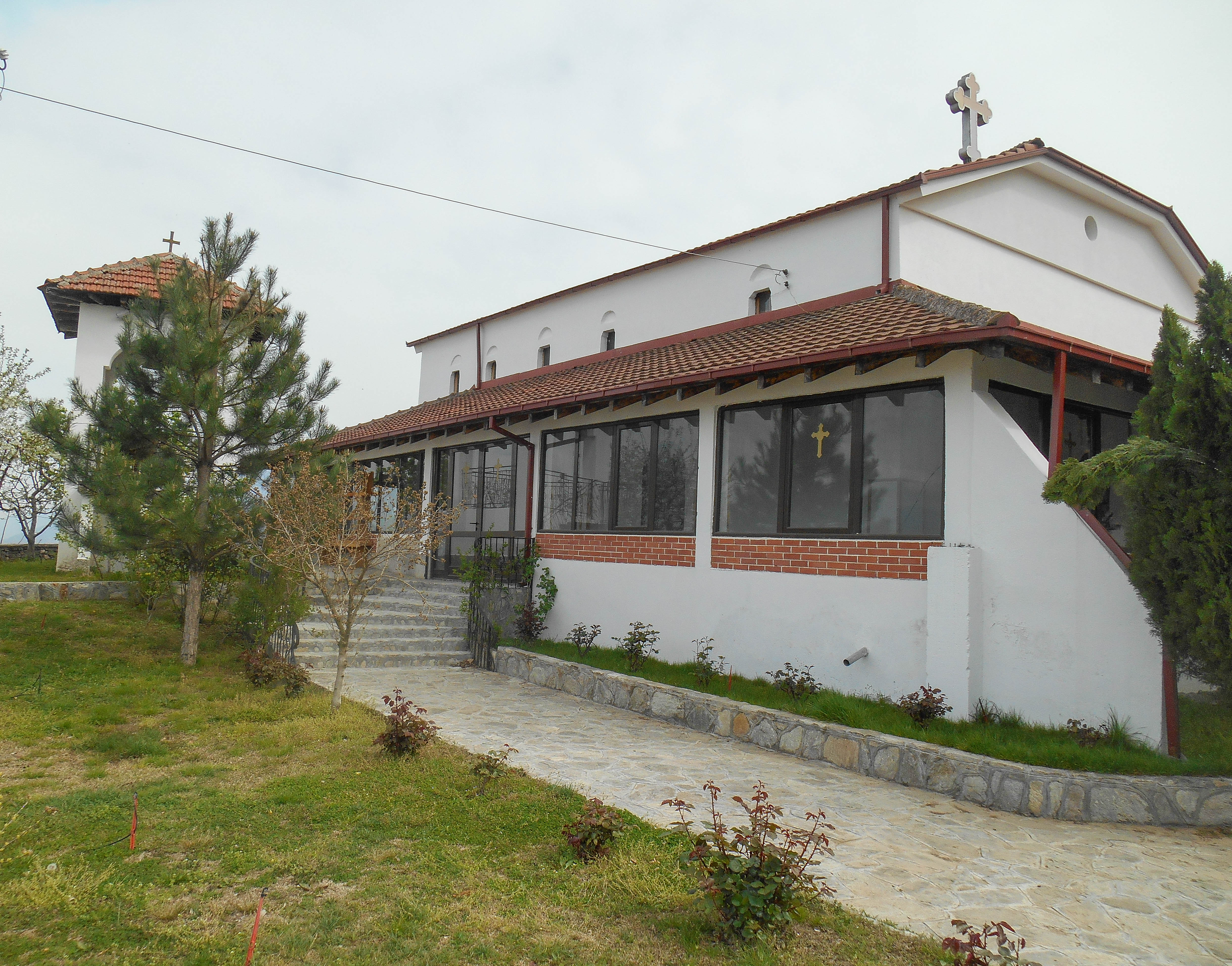 Црква „Св. Атанасиј“ - Куклиш